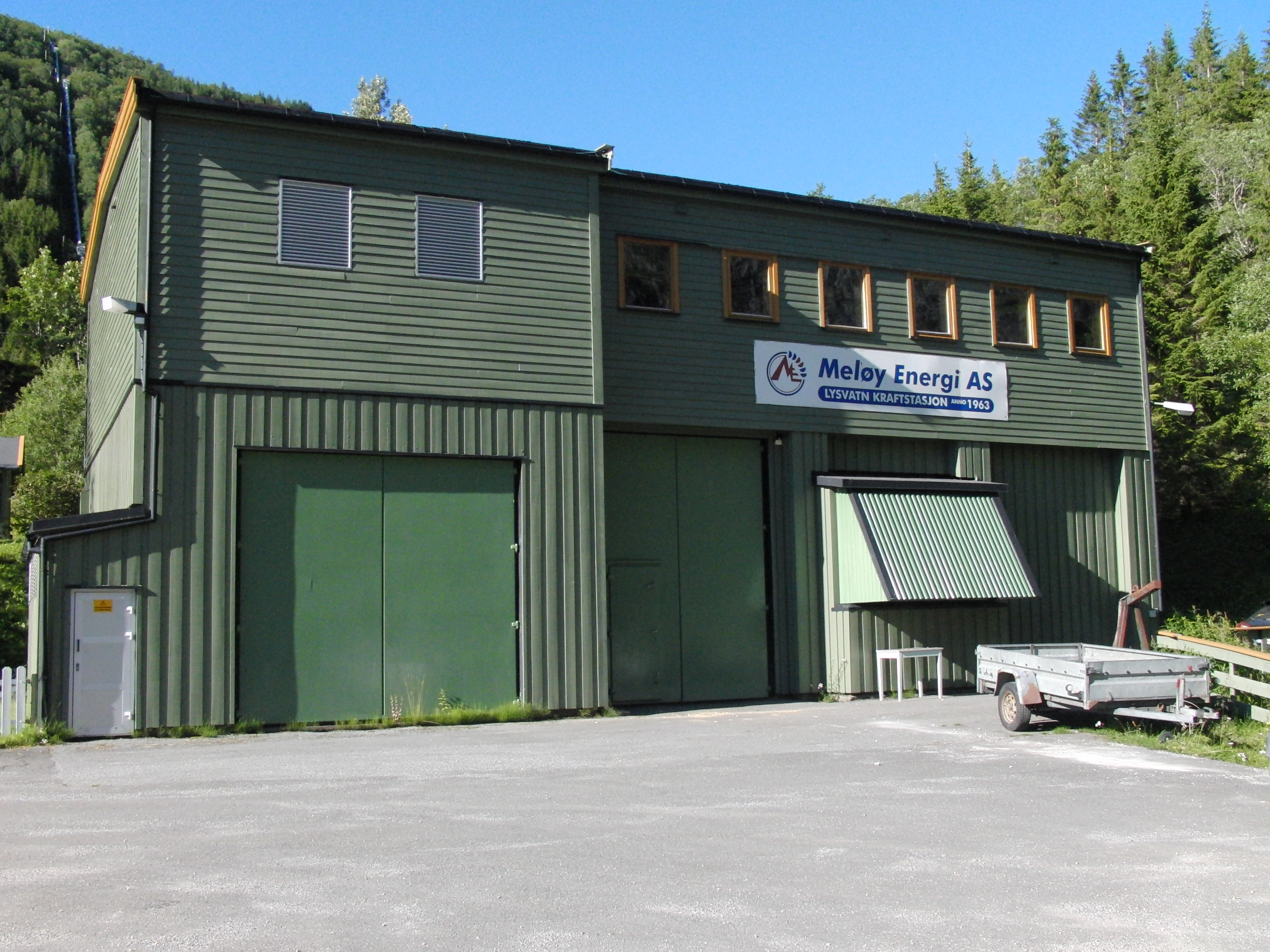 Lysvatn kraftverk